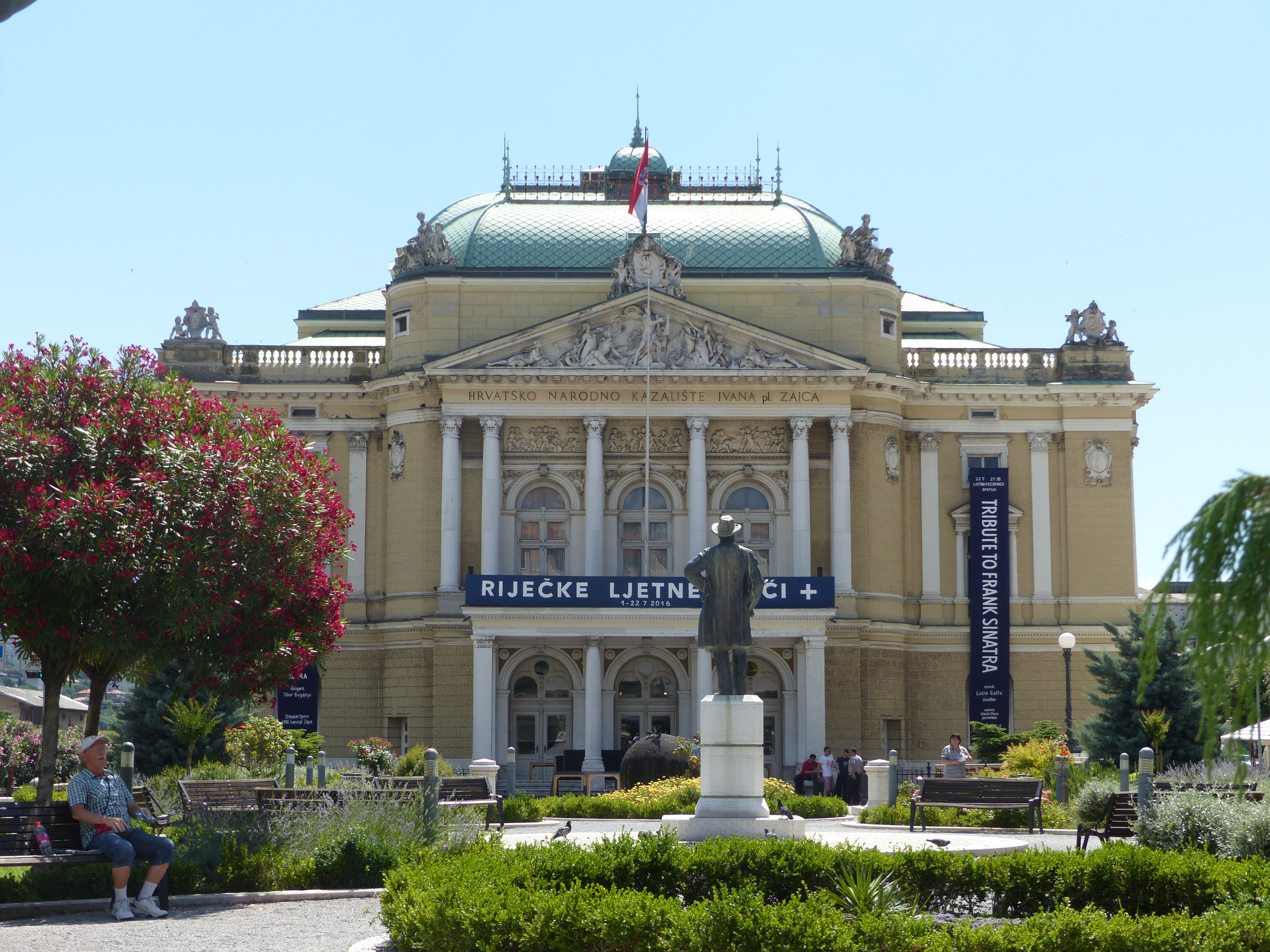 A felvétel 2016. június 28-án készült Fiuméban, Horvátországban. Az Osztrák-Magyar Birodalom idején, 1885-ben épült Az első előadás Verdi Aidája volt a színházban.